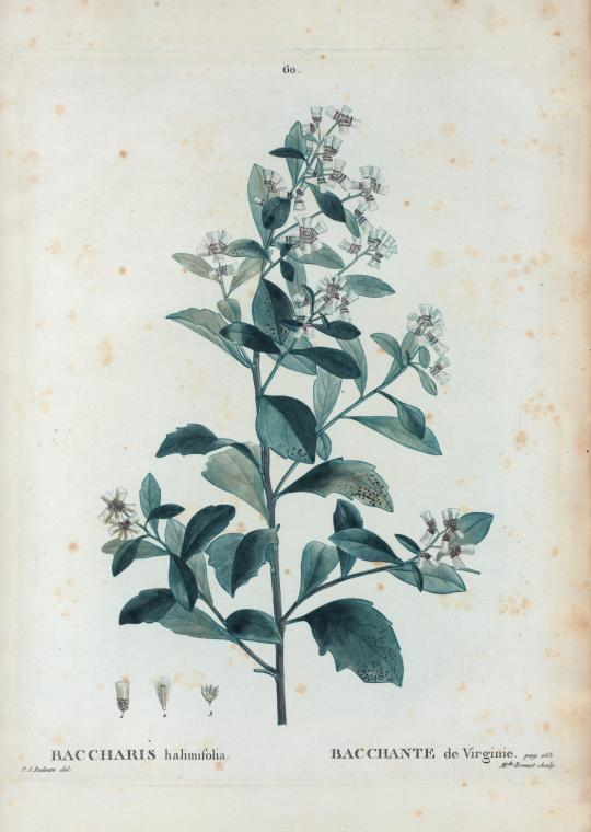 Baccharis halimifolia = Bacchante de Virginie.